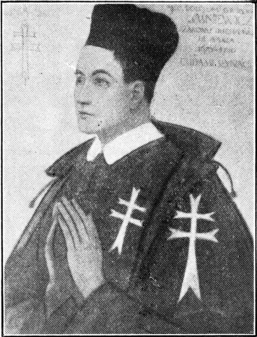 Histoire de l'Ordre Hospitalier du Saint-Esprit Auteur Paul Brune Éditeur C. Martin, 1892